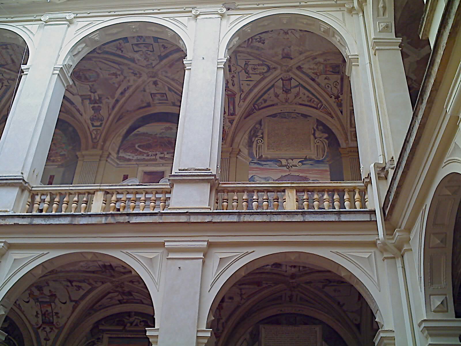 Patio interior del Palacio del Marqués de Santa Cruz en el Viso del Marqués (provincia de Ciudad Real - España).